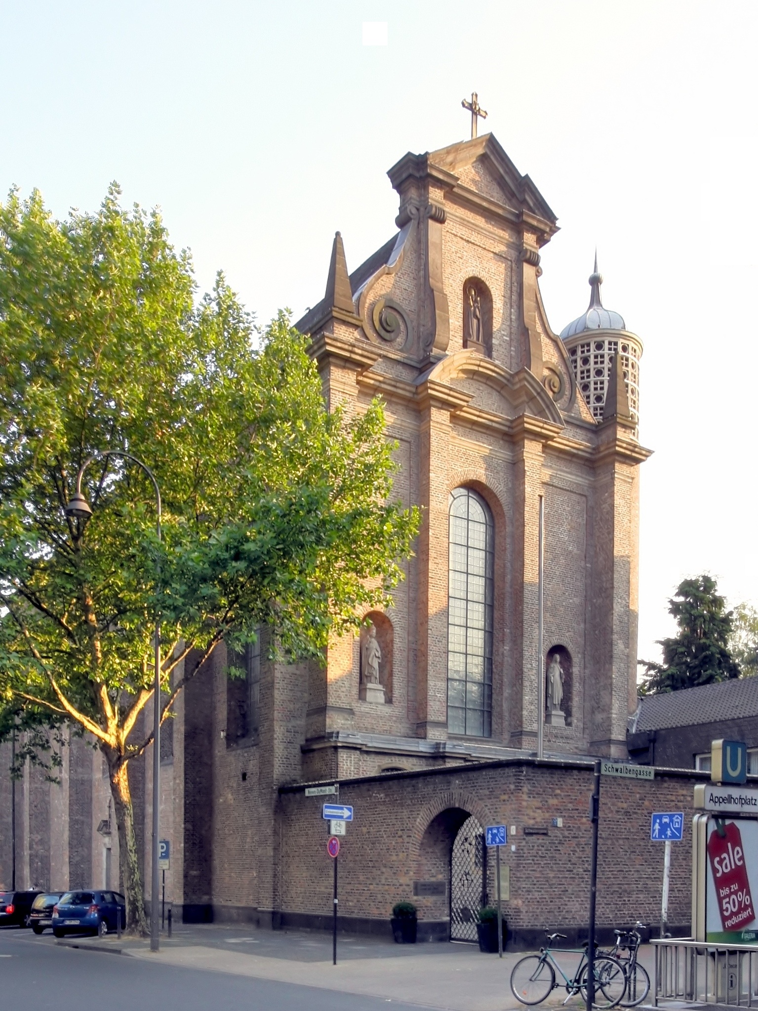 Nordseite der Kirche St. Maria in der Kupfergasse, Köln. This is a photograph of an architectural monument.